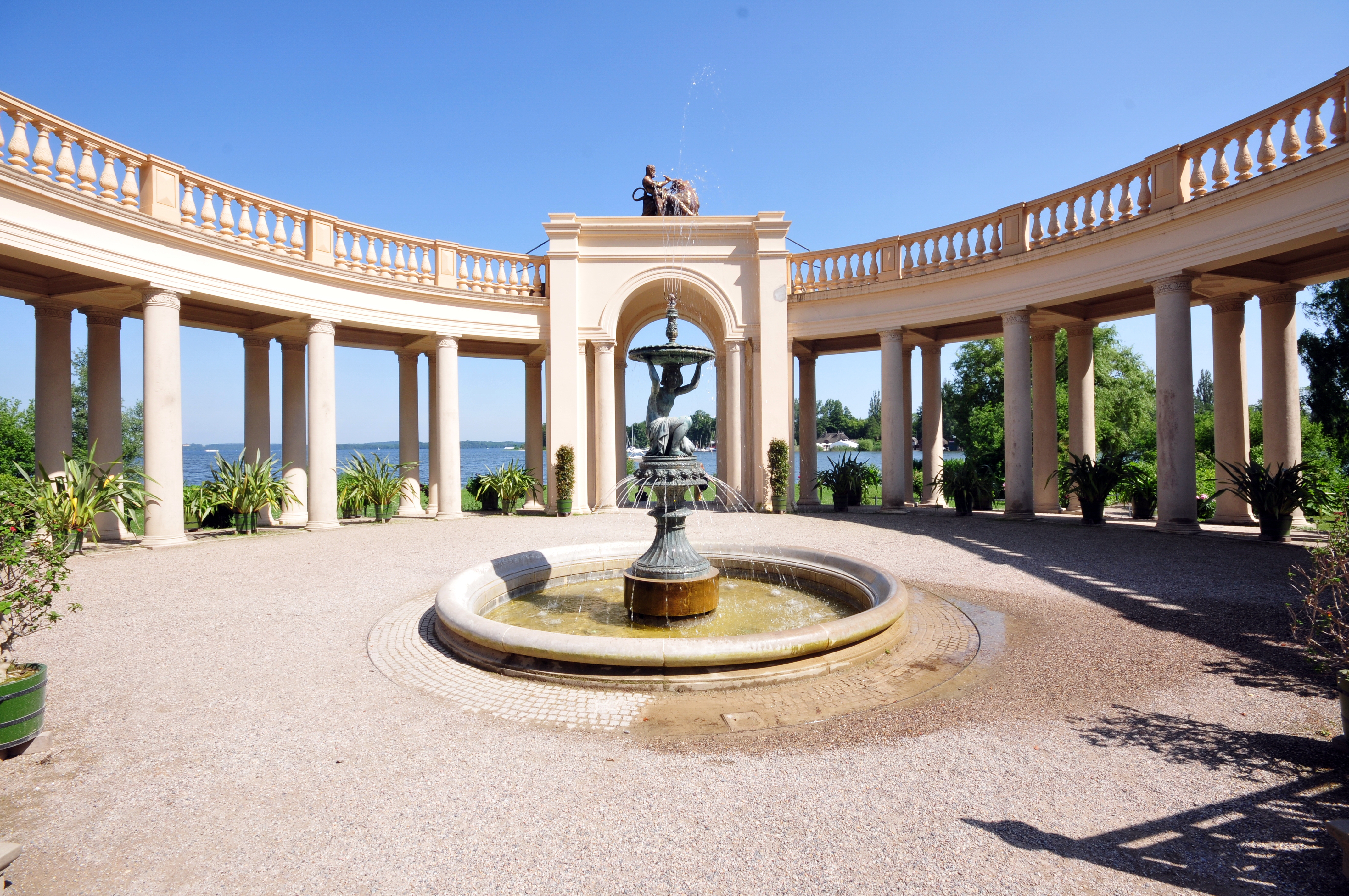 Schweriner Schloß; Orangerie und Schloßgarten